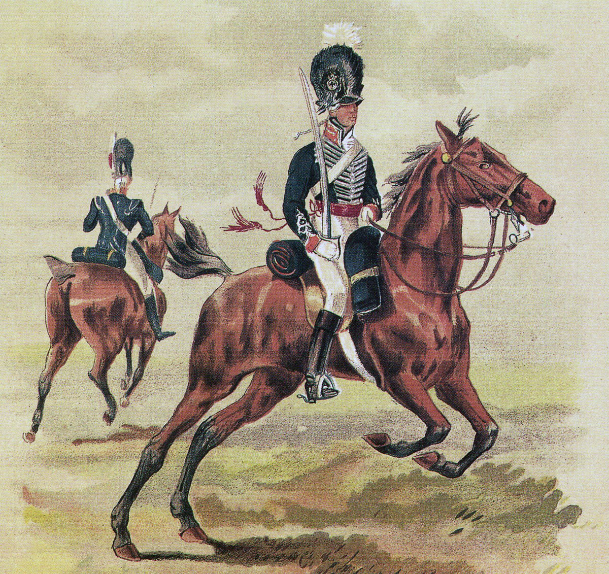 Officiers du 14e régiment de dragons légers britannique, début du XIXe siècle.